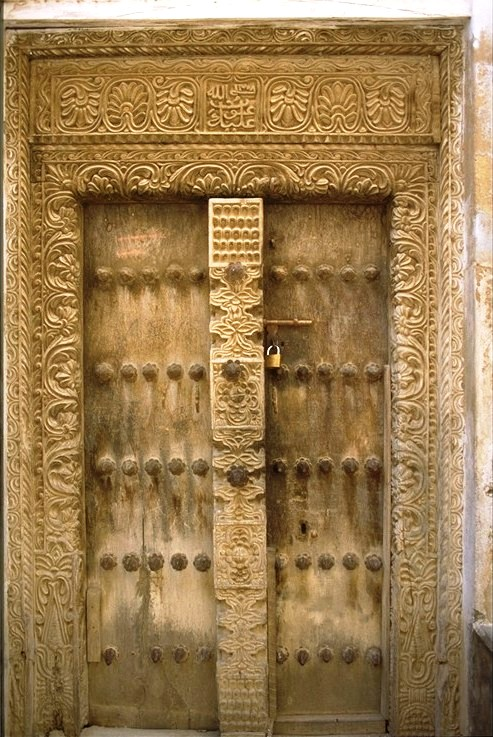 Door in Zanzibar, 1996